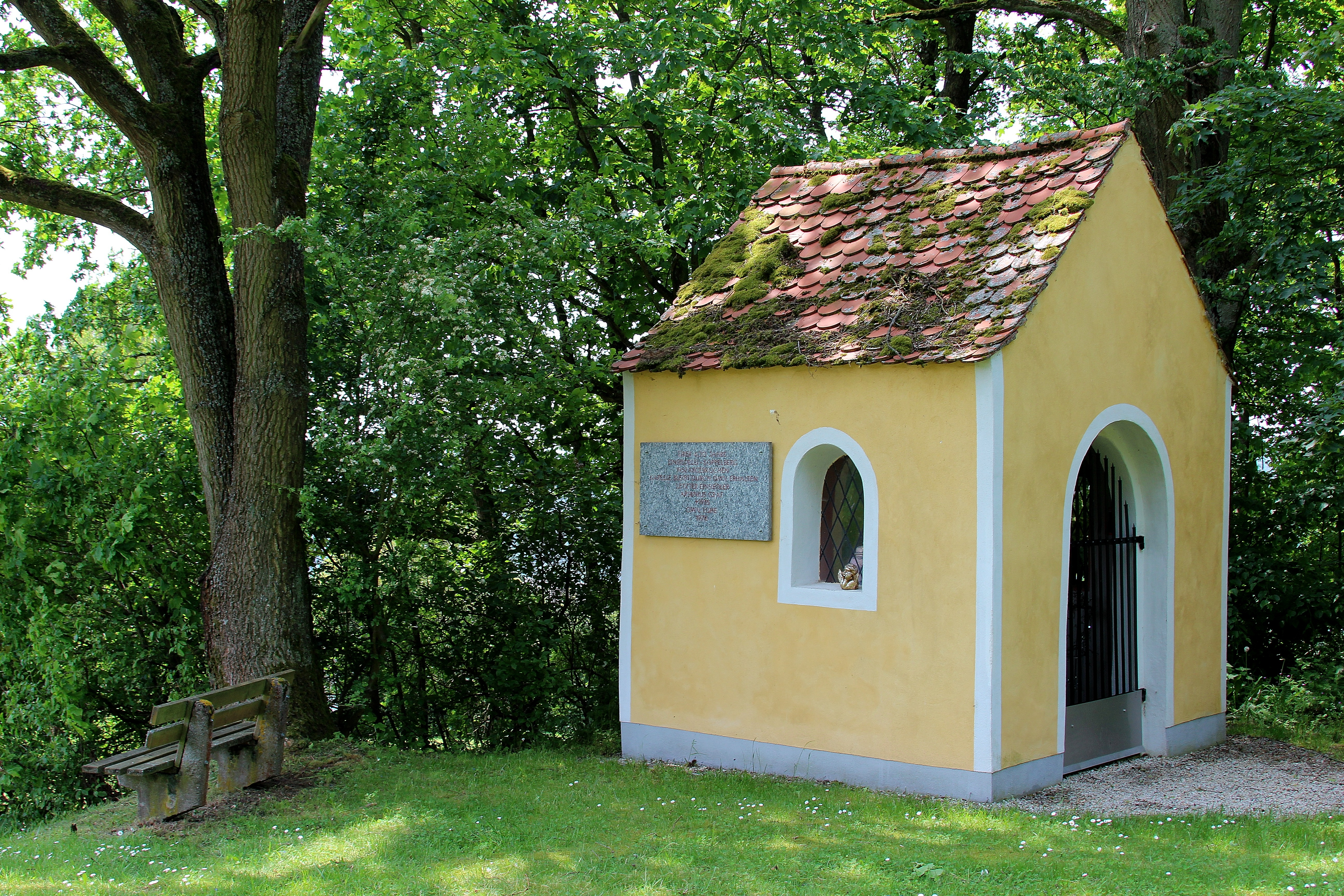 Einsiedlerkapelle; Luhe-Wildenau, Landkreis Neustadt an der Waldnaab, Oberpfalz, Bayern